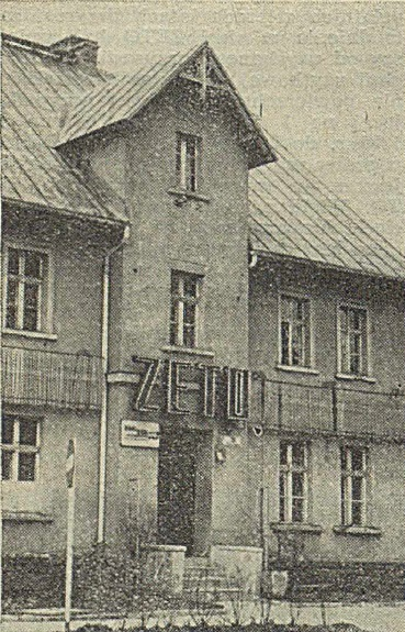 Jelenia Góra, ZETO